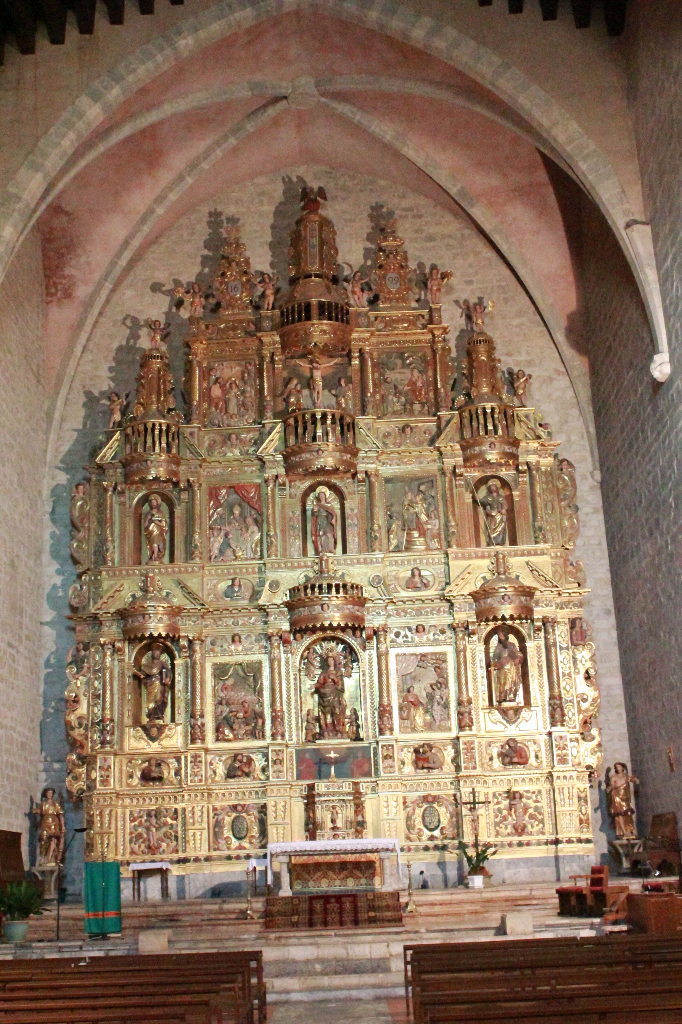 Baixas (66) retable de l'église Le plus grand retable baroque de France